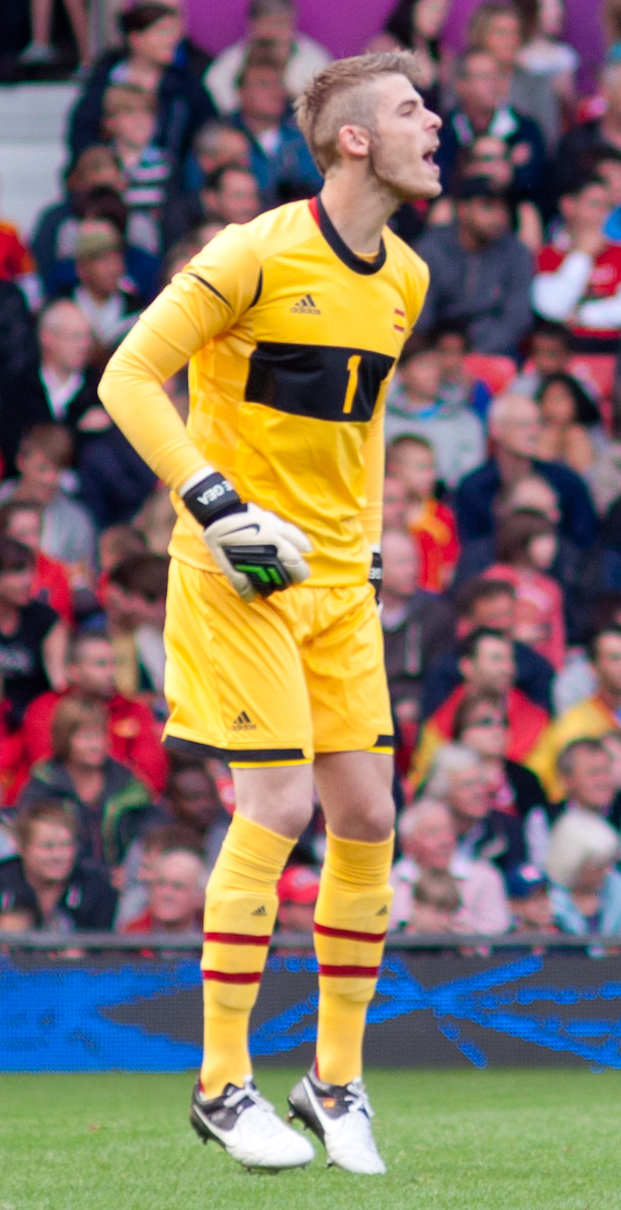 Partido oficial de los Juegos Olímpicos Londres 2012, España vs Marruecos, con resultado de 0 - 0